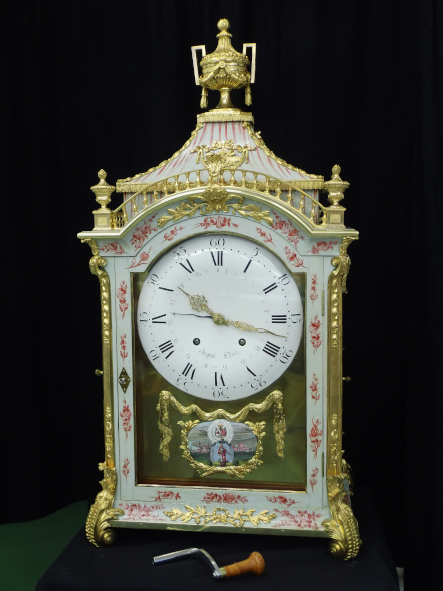 Pendule